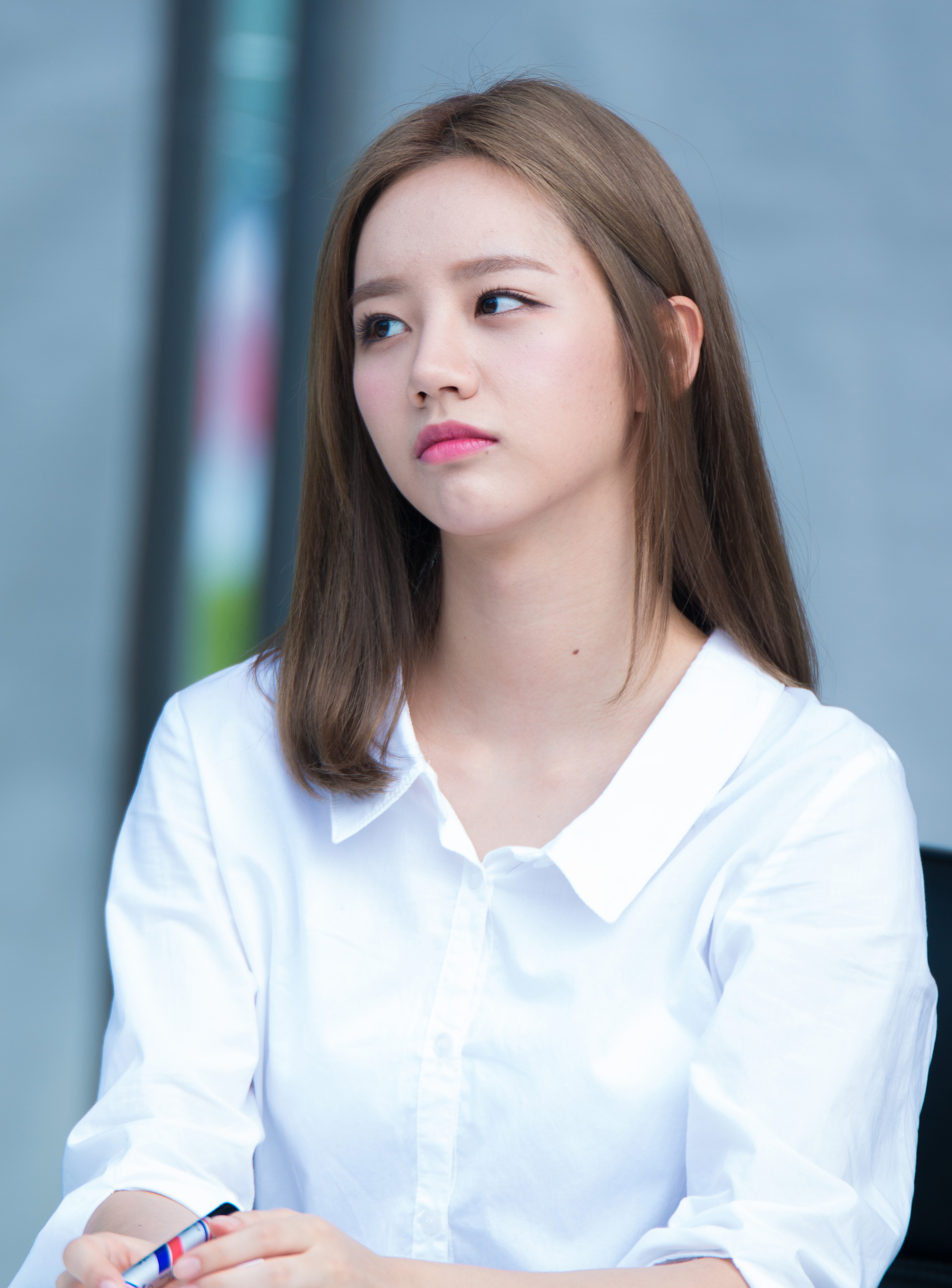 20160910 걸스데이 혜리 세븐일레븐 도시락 팬사인회